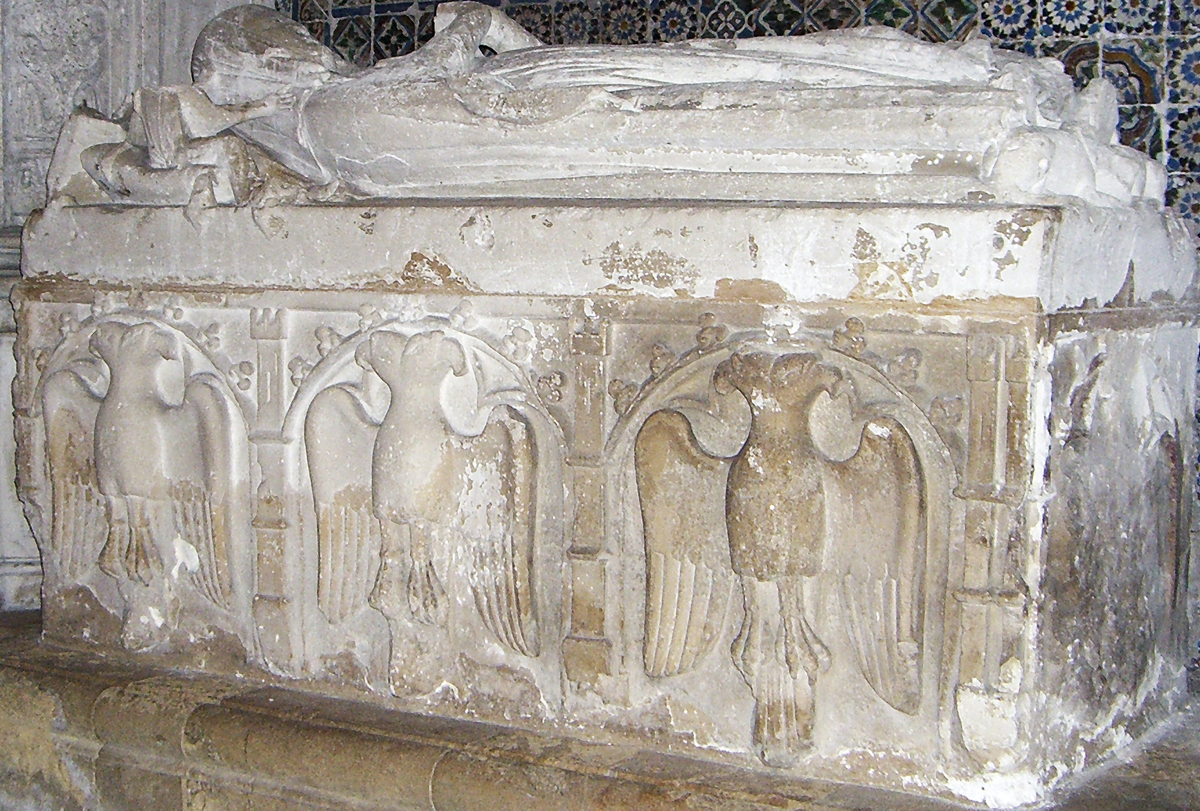 Tumulo de Vataça Lascaris na Sé Velha de Coimbra